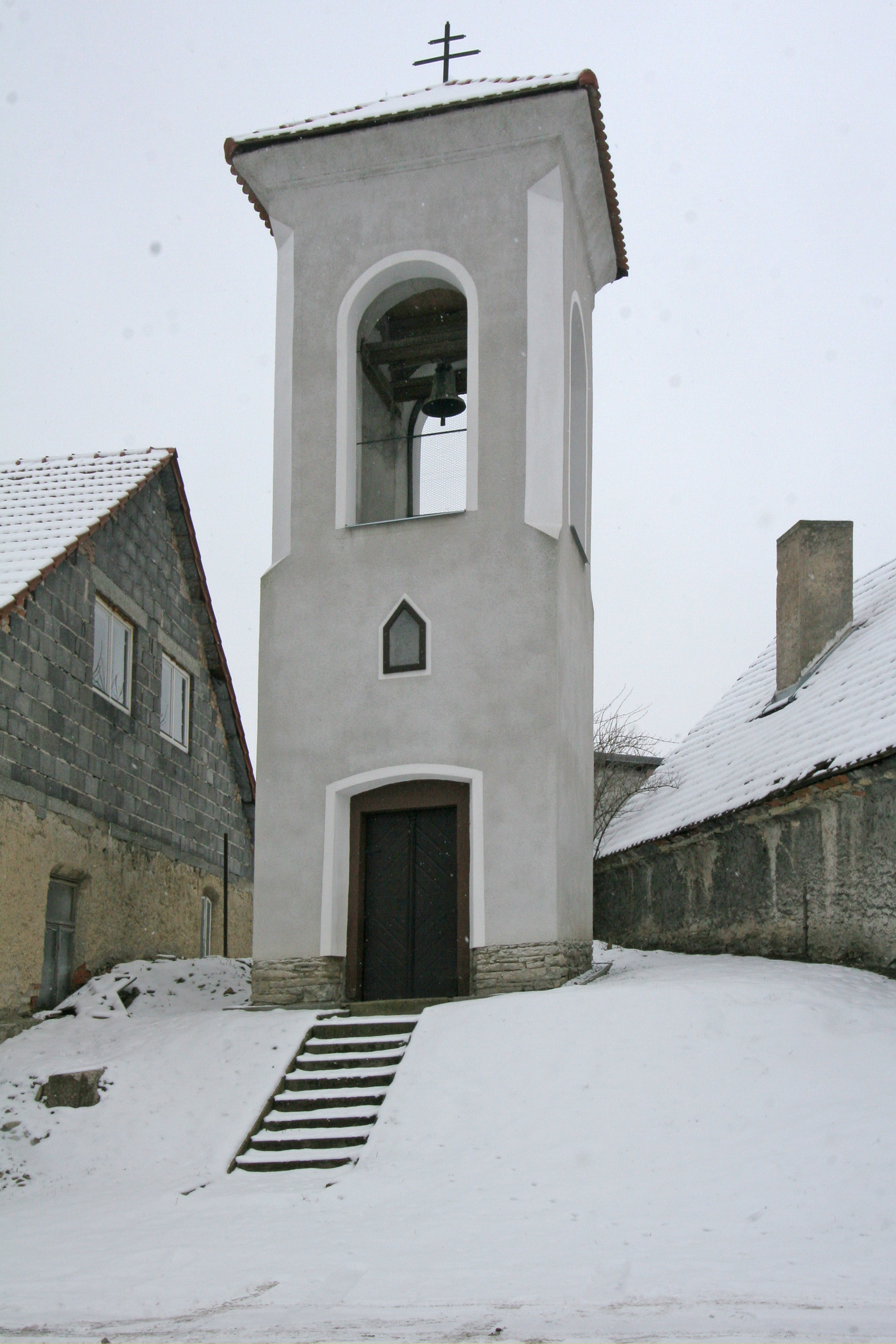 Stradouň zvonička